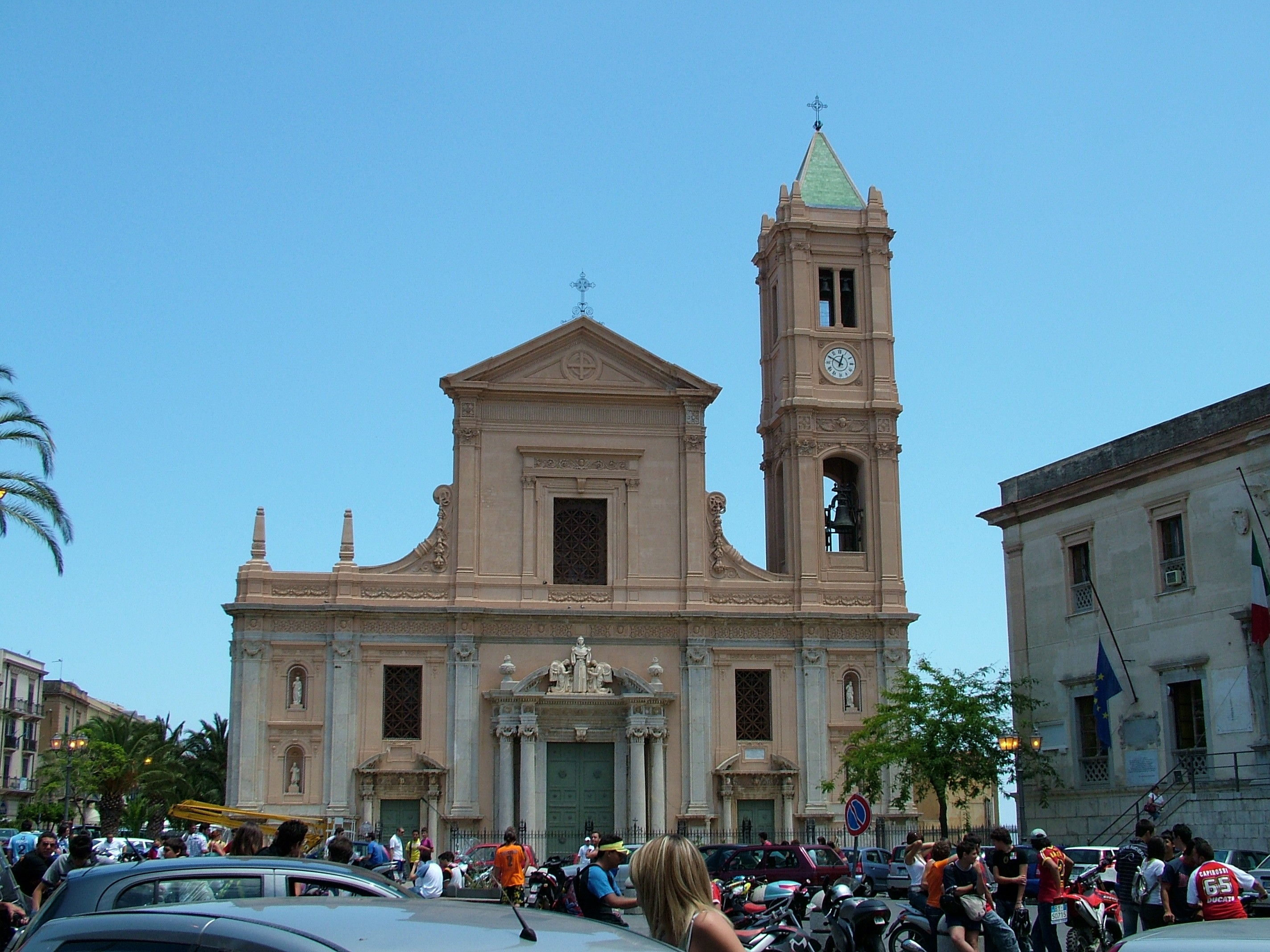 Termini Imerese, Sizilien, der Dom